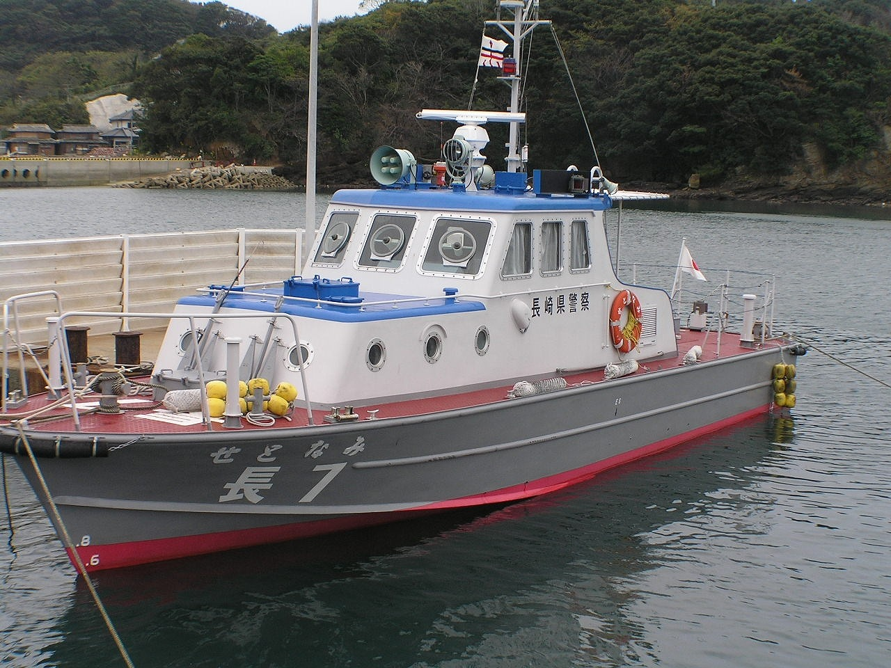 長崎県警察せとなみ